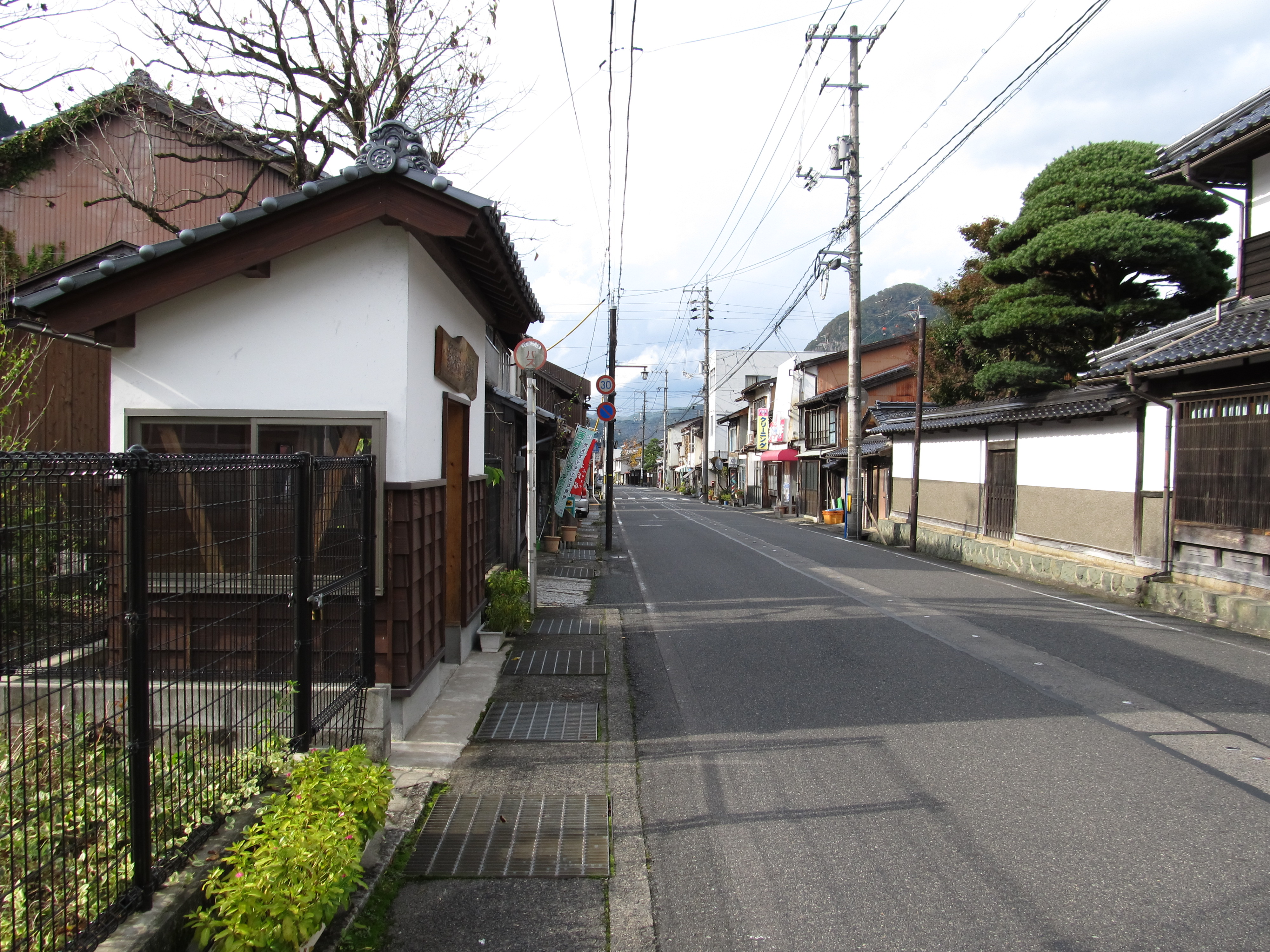 鳥取県道103号若桜湯村温泉線（鳥取県八頭郡若桜町）。 画像左側には日本交通バス若桜駅前停留所がある。